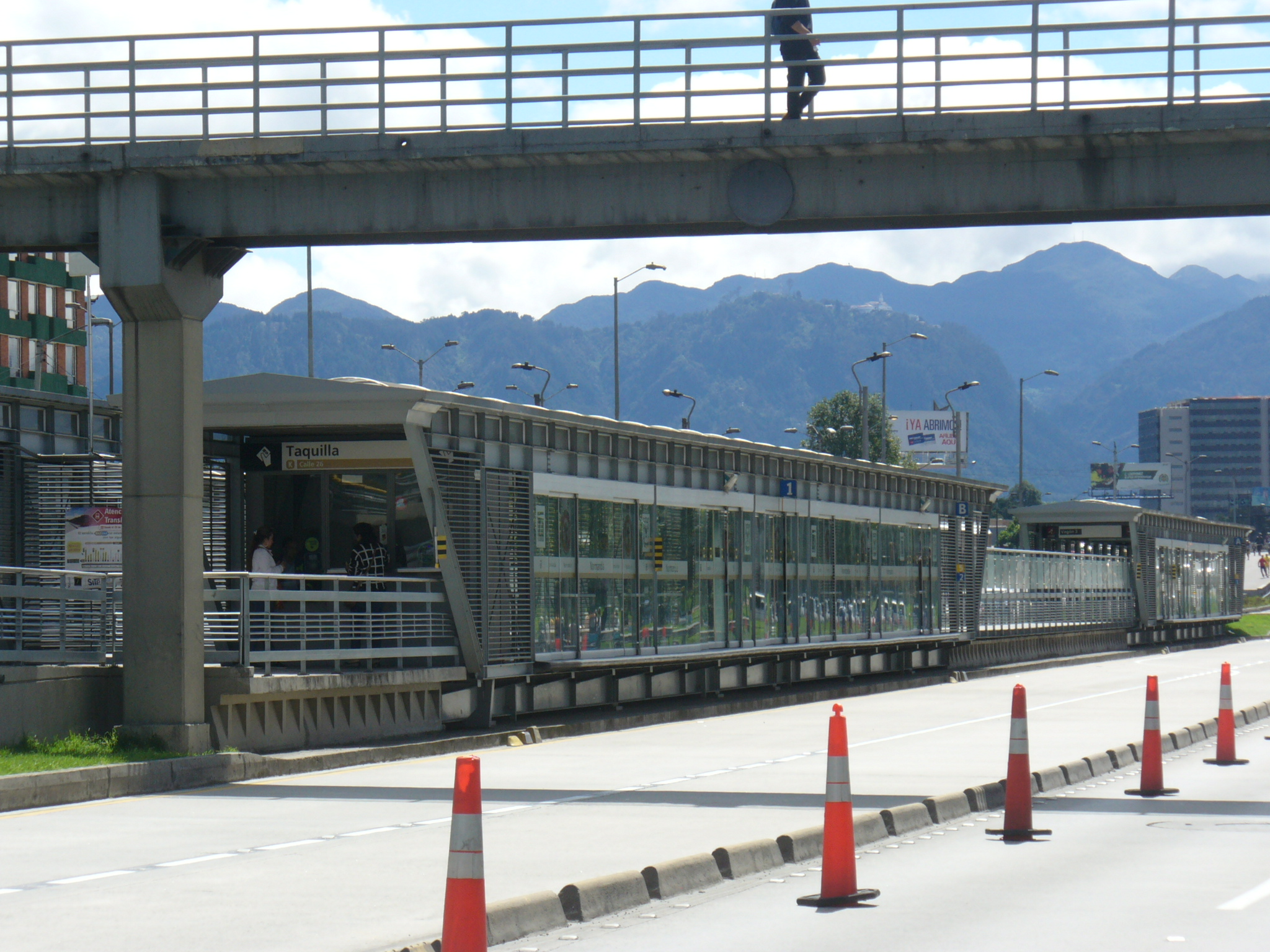 Estación Normandía del sistema Transmilenio.